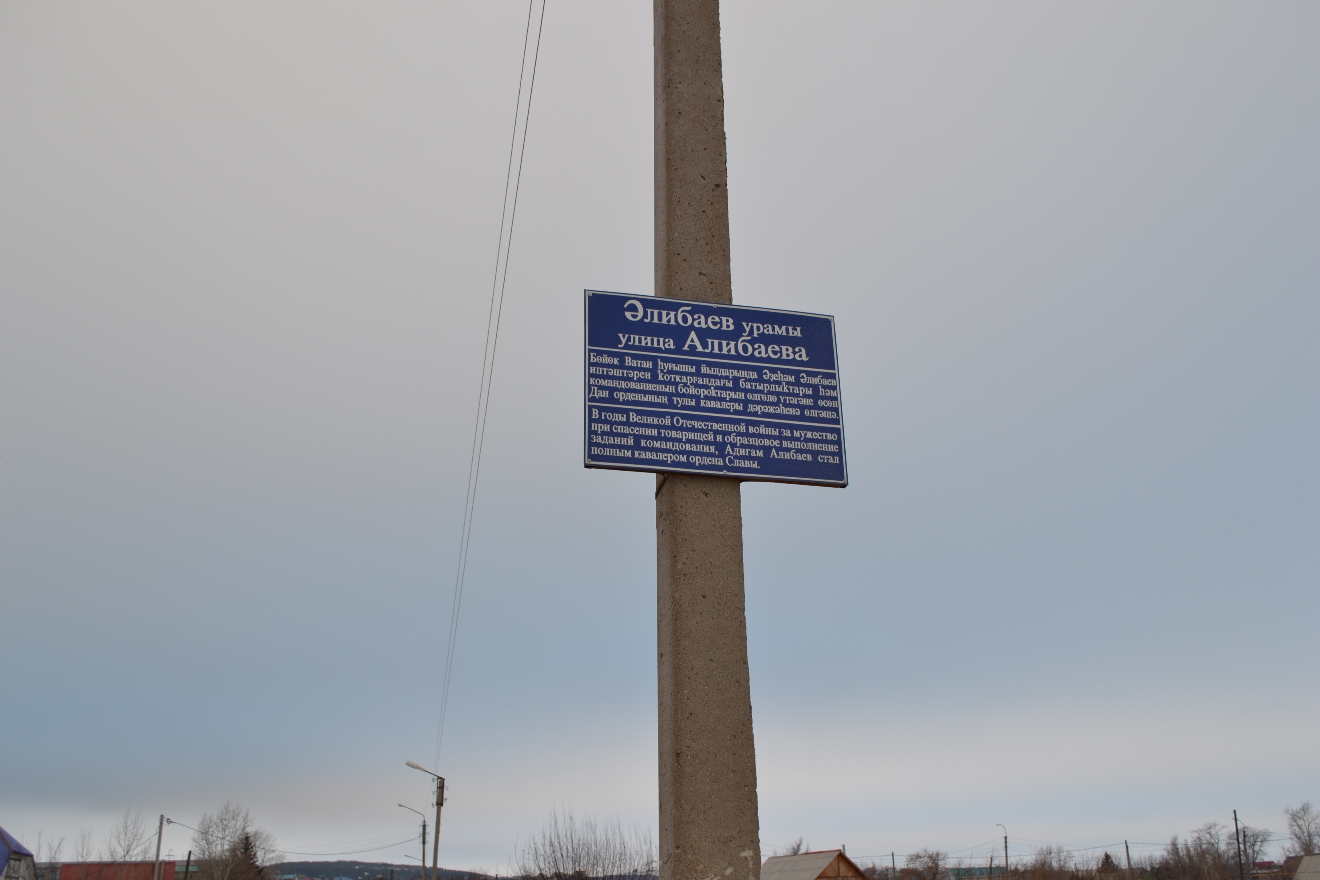 Памятный знак_улицы Алибаева в Баймаке